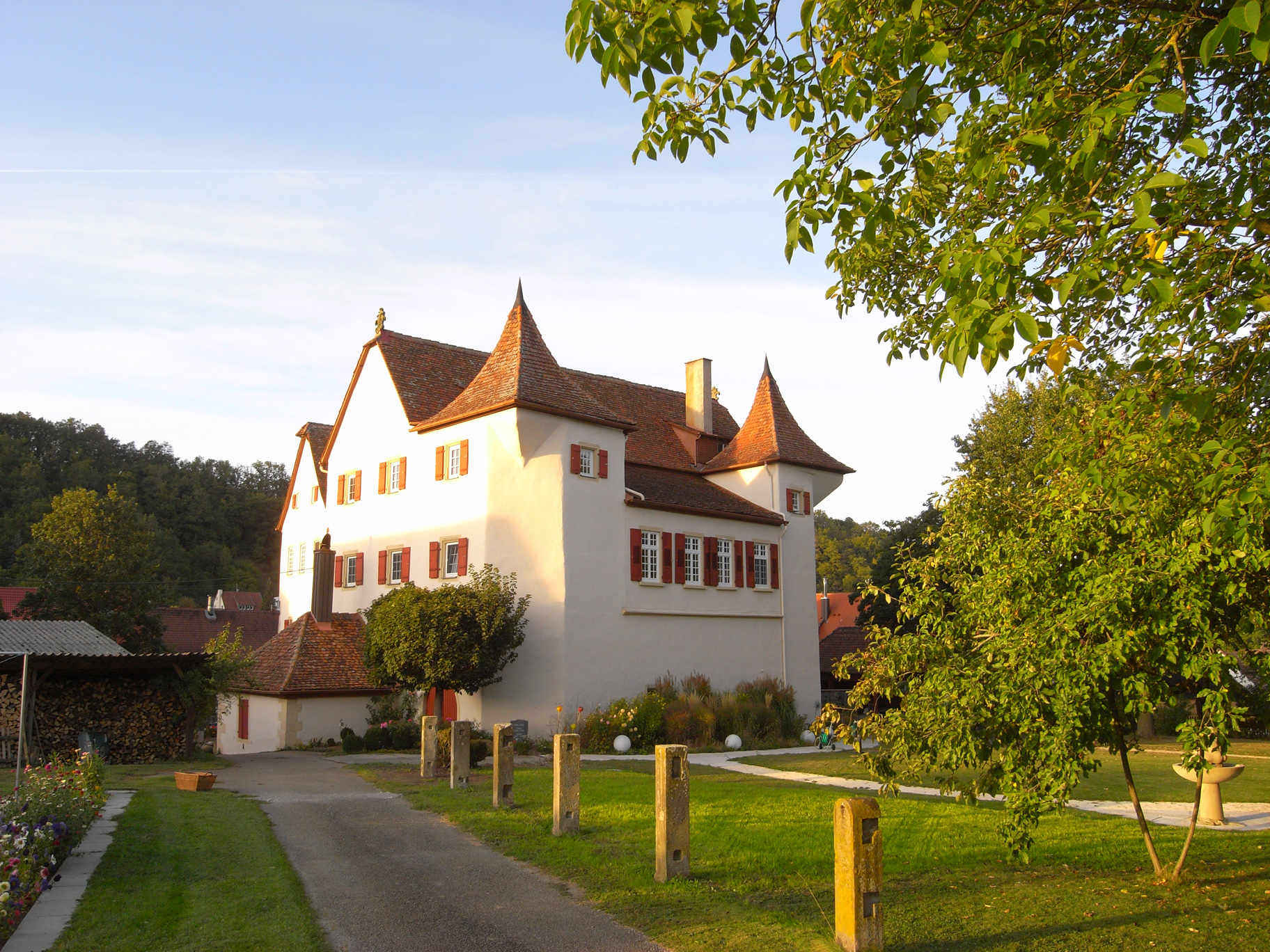 Tullauer Schloss bei Schwäbisch Hall